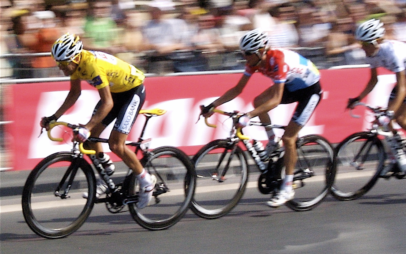 Paris - Tour de France 2008 Winner - Carlos Sastre - Maillot Jaune